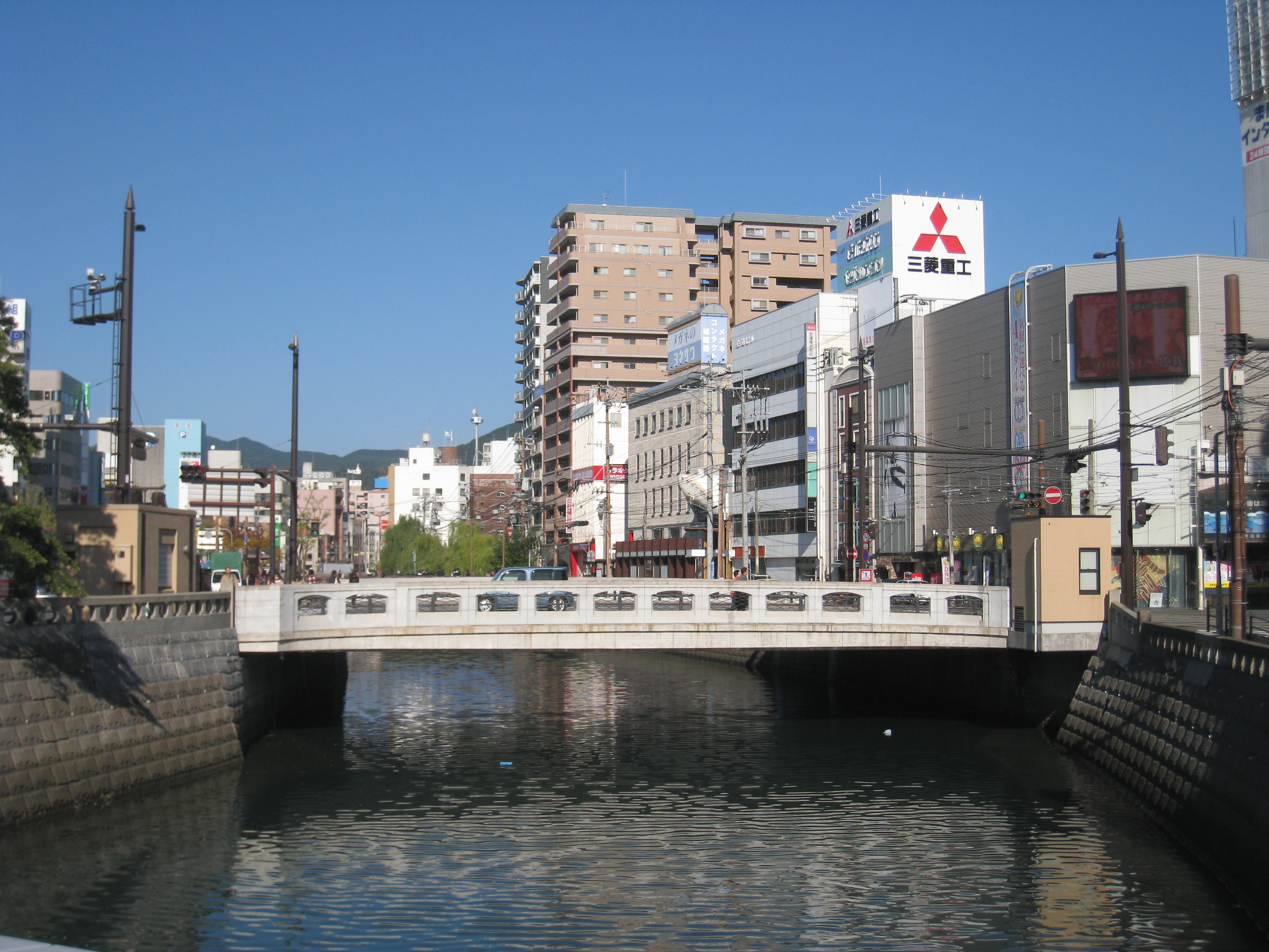 新しい中央橋